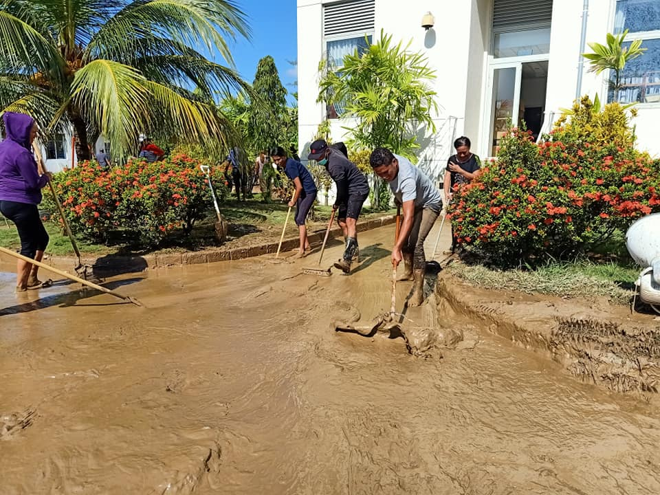 Flut in Dili, 13. März 2020: Aufräumarbeiten am Präsidentenpalast